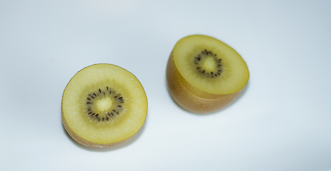 Sliced golden kiwifruit.